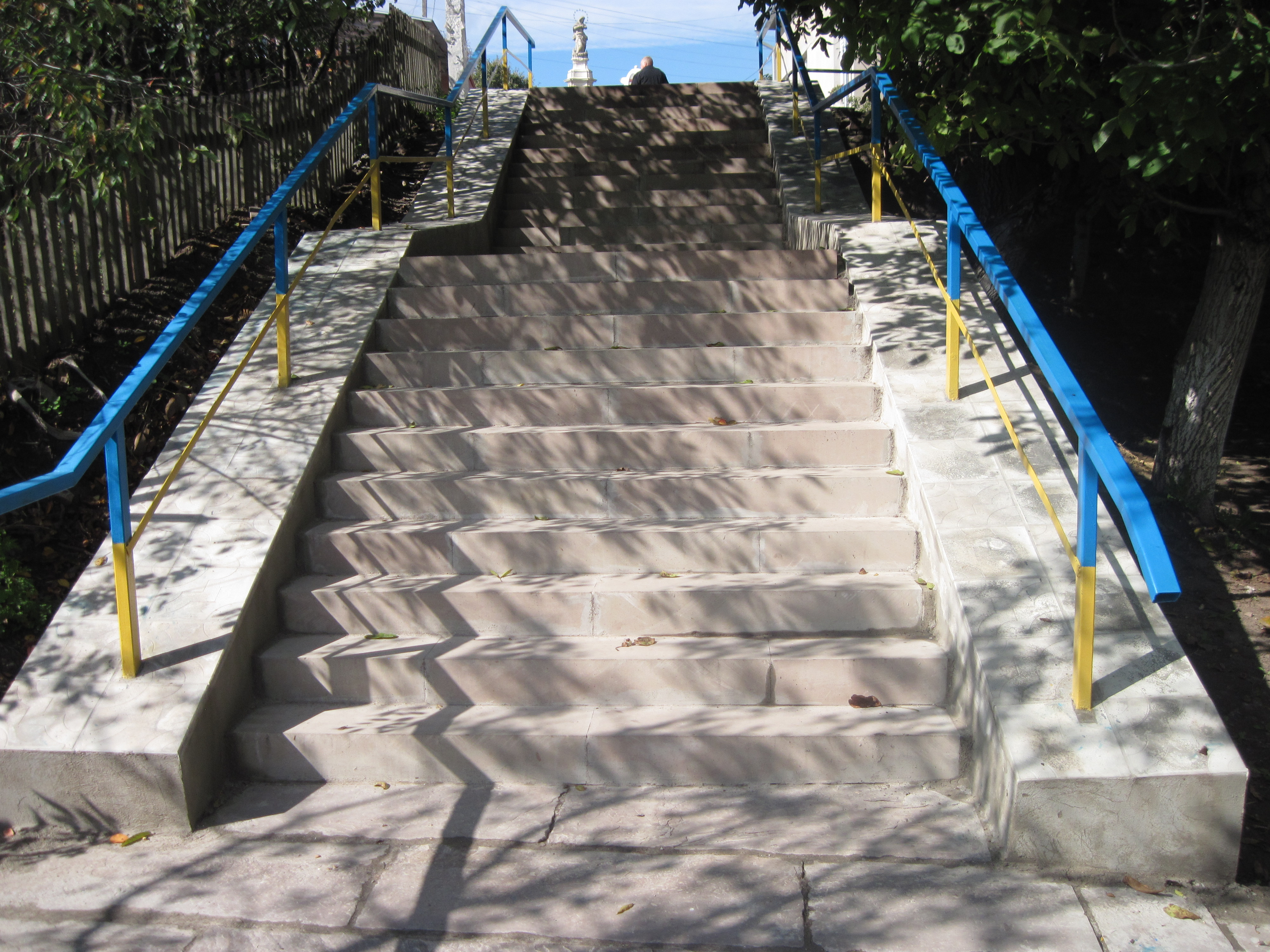 Нові сходи від ц. св. Миколая до Сонечка